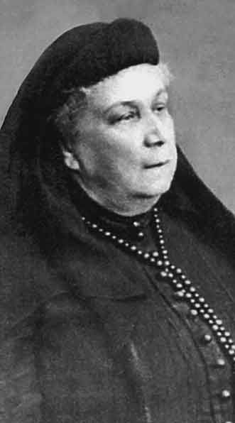 Баронесса Мария Дмитриевна Врангель (1856—1944) — мать одного из руководителей Белого движения генерала Петра Врангеля. Фотография 1900-х годов